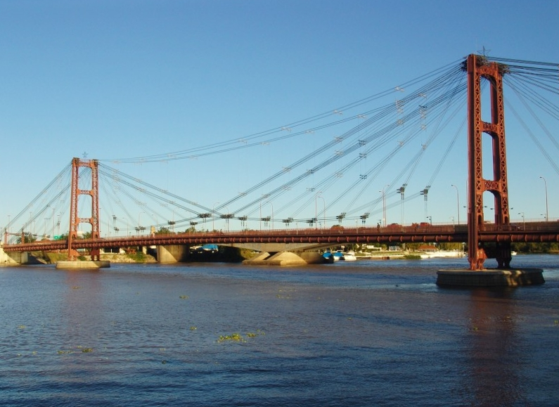 Puente Colgante (Santa Fe, Argentina)